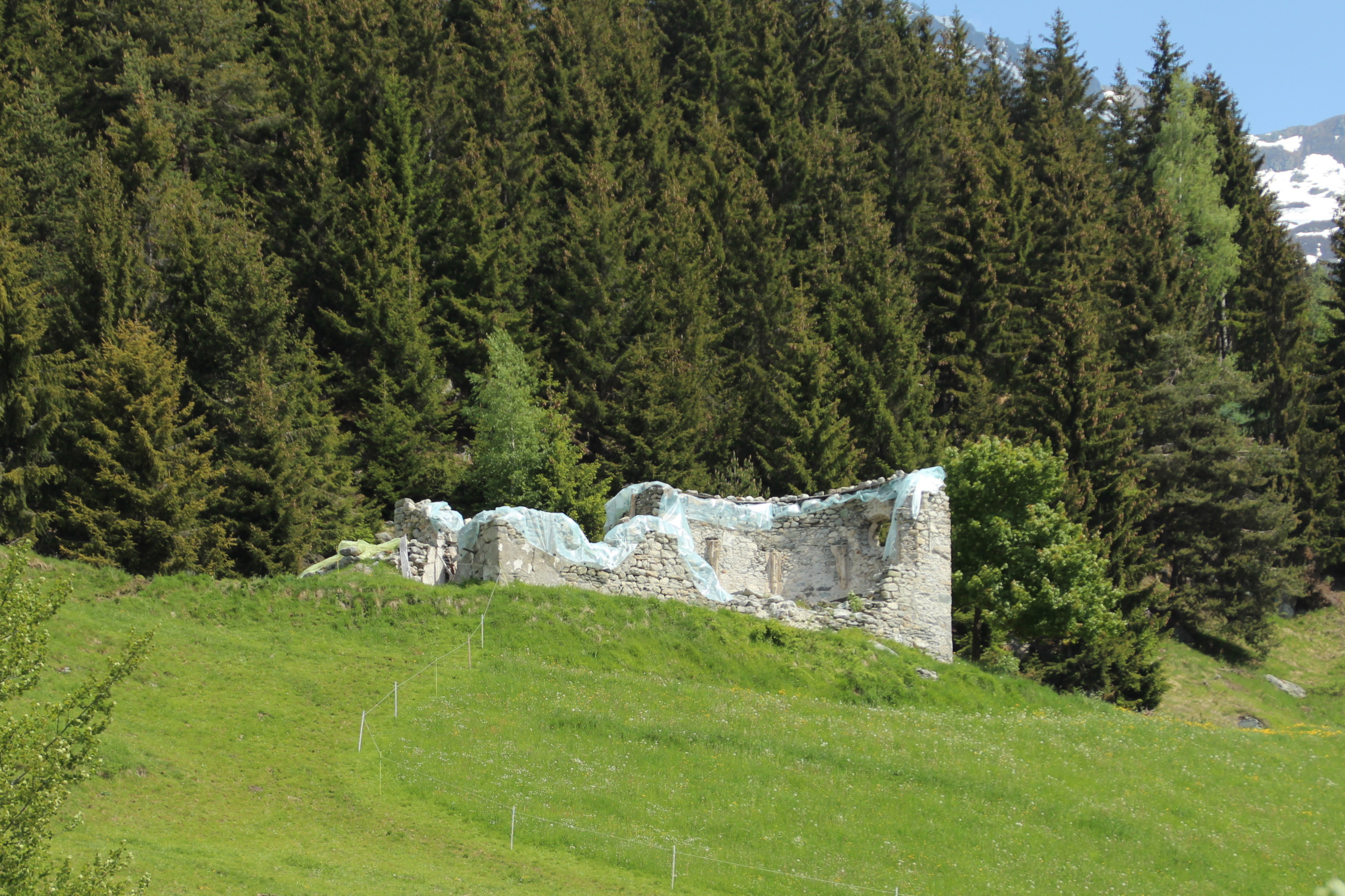 Caplutta Sogn Benedetg Ansicht von Süden